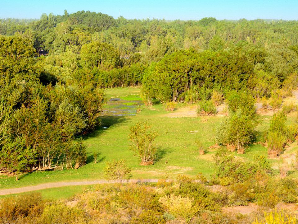 Se destaca en Paso Cordova el Verde y la Tranquilidad. Lugar ideal para pasar el día en familia. Foto de Javier Larrea Fotografía